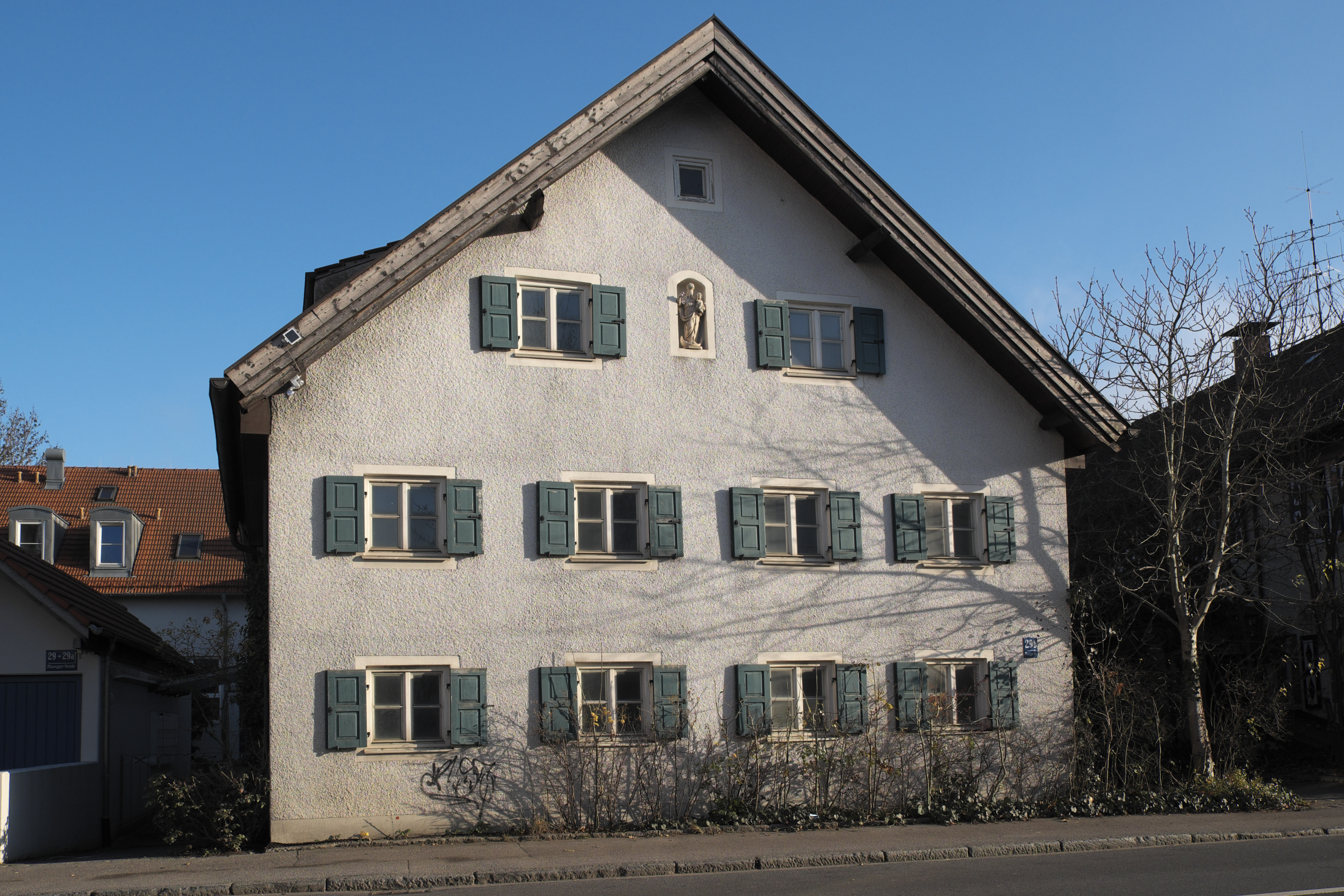 Ehemaliges Bauernhaus in der Planegger Straße 29 im Münchner Stadtteil Pasing (Bayern, Deutschland)